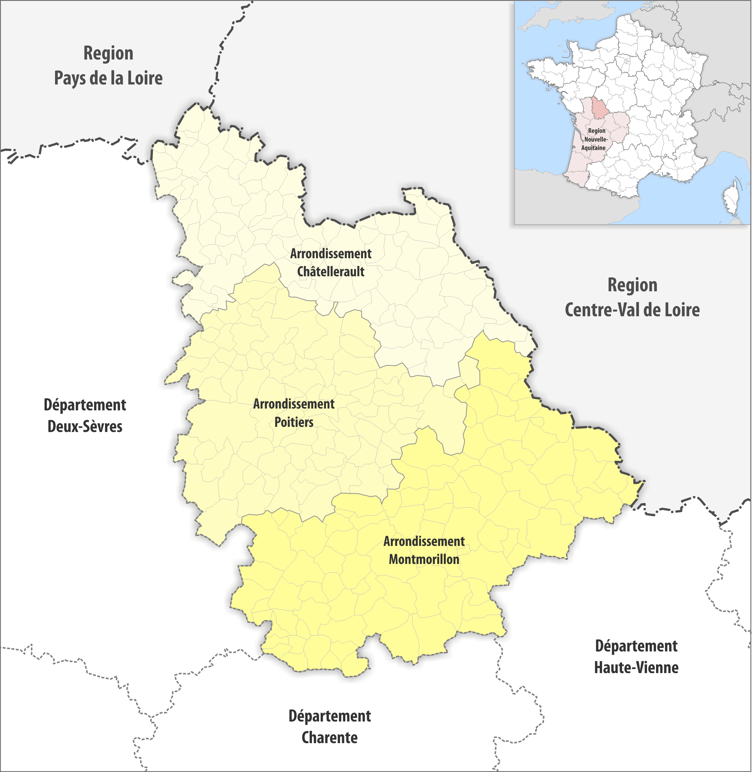 Gemeinden und Arrondissemente im Departement Vienne